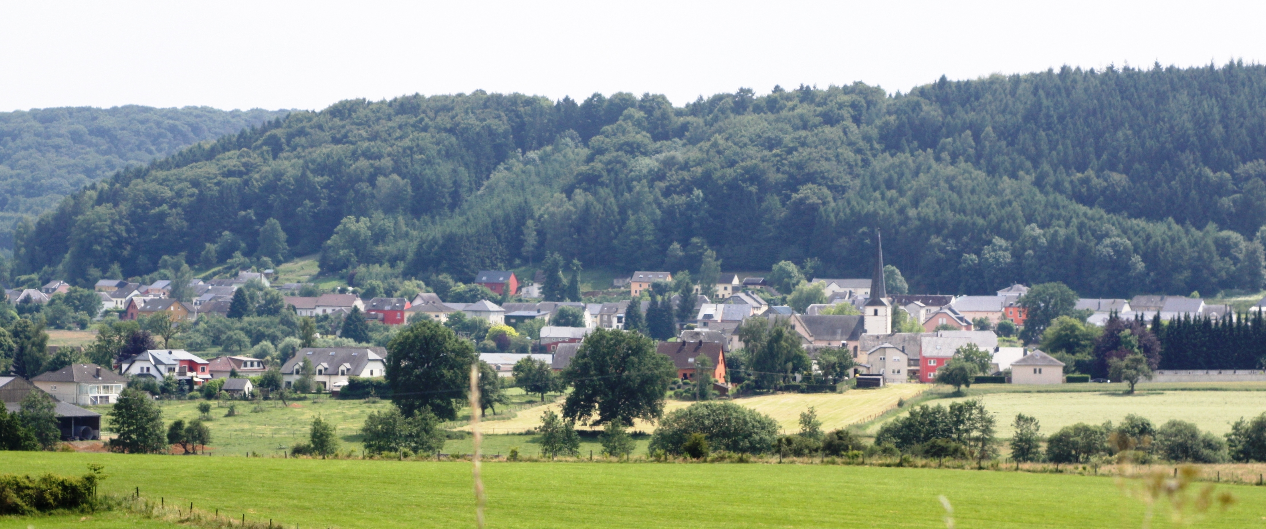 Biekerech vum Kinn aus gesinn mam Kuelebierg.